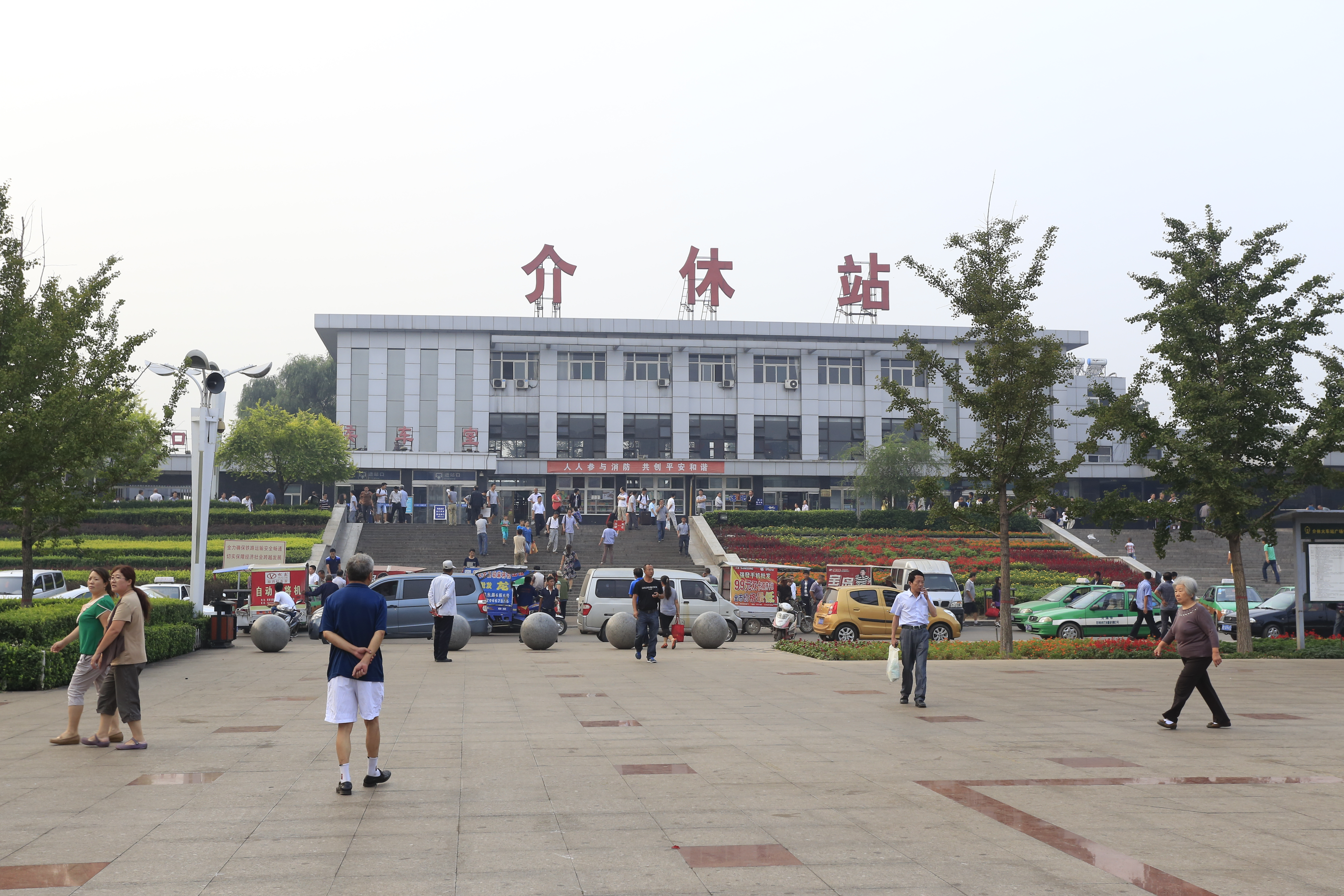 介休站